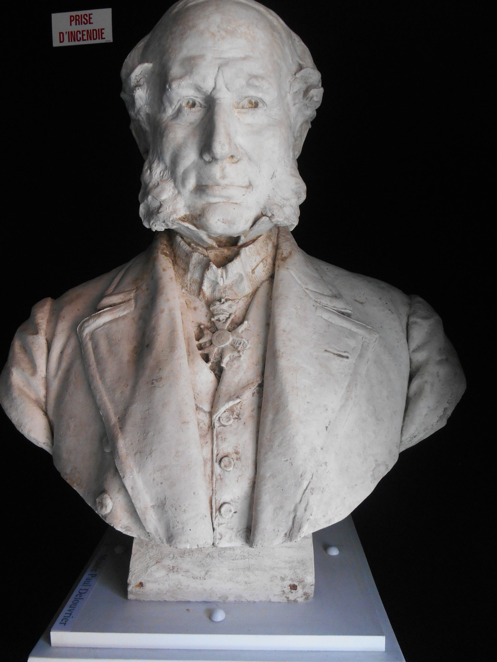 Buste d'Aymé Stanislas Darblay, conservé au Musée d'Evry (91)